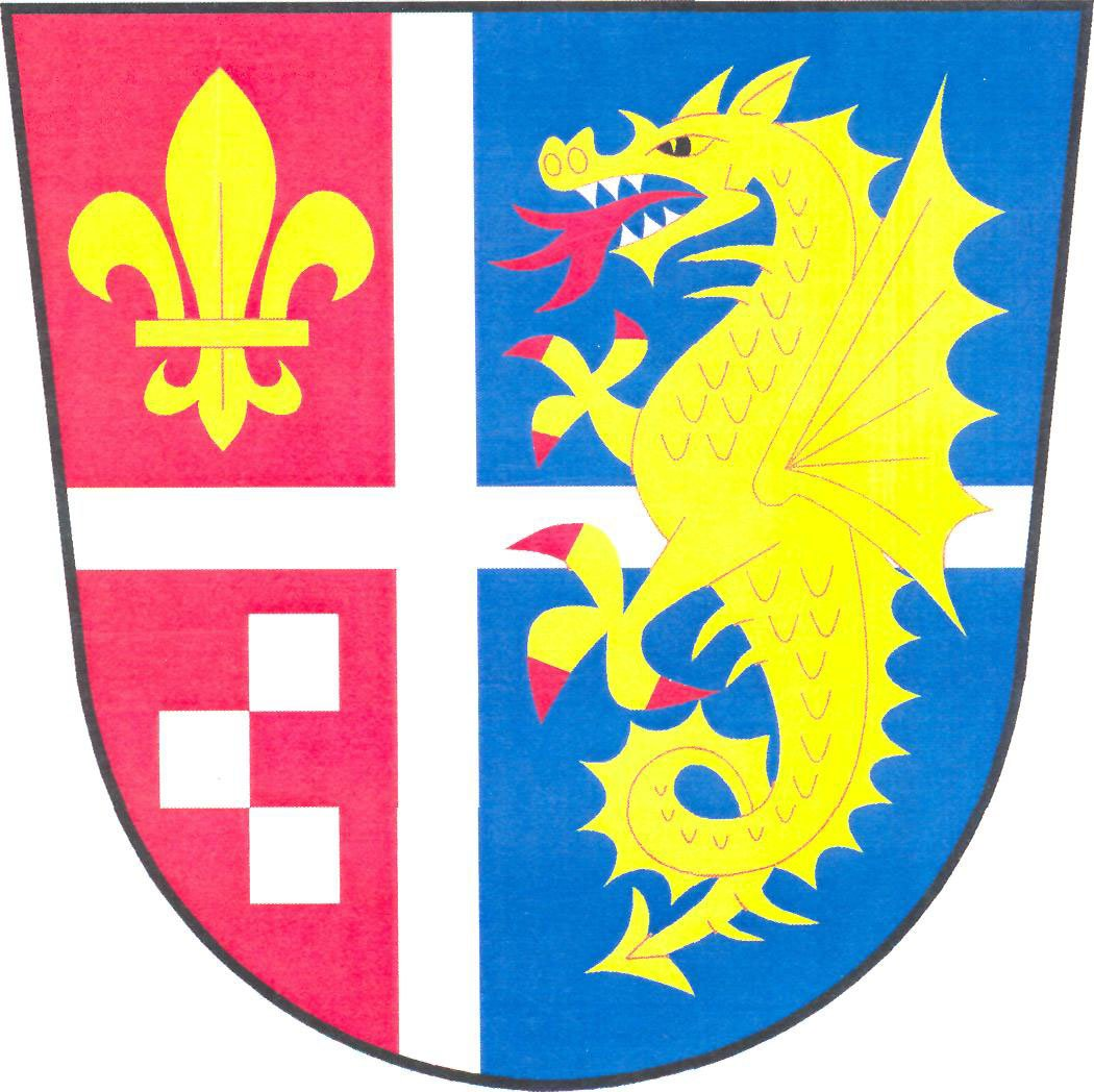 Erpužice - vlajka Contents 1 Licensing 2 Zdroj 3 Licensing 4 Original upload log Licensing Zdroj Registr komunálních symbolů